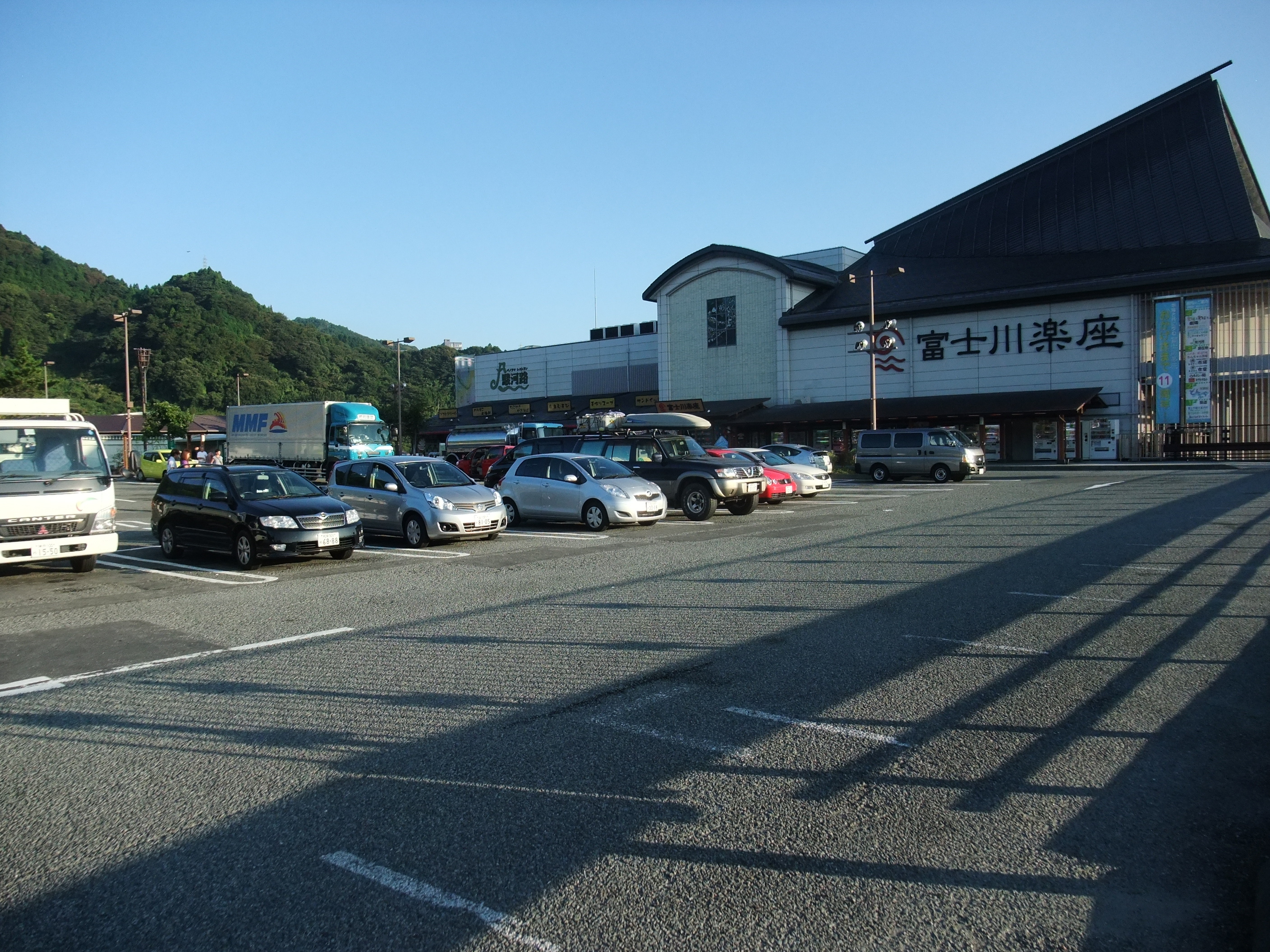 富士川ＳＡ